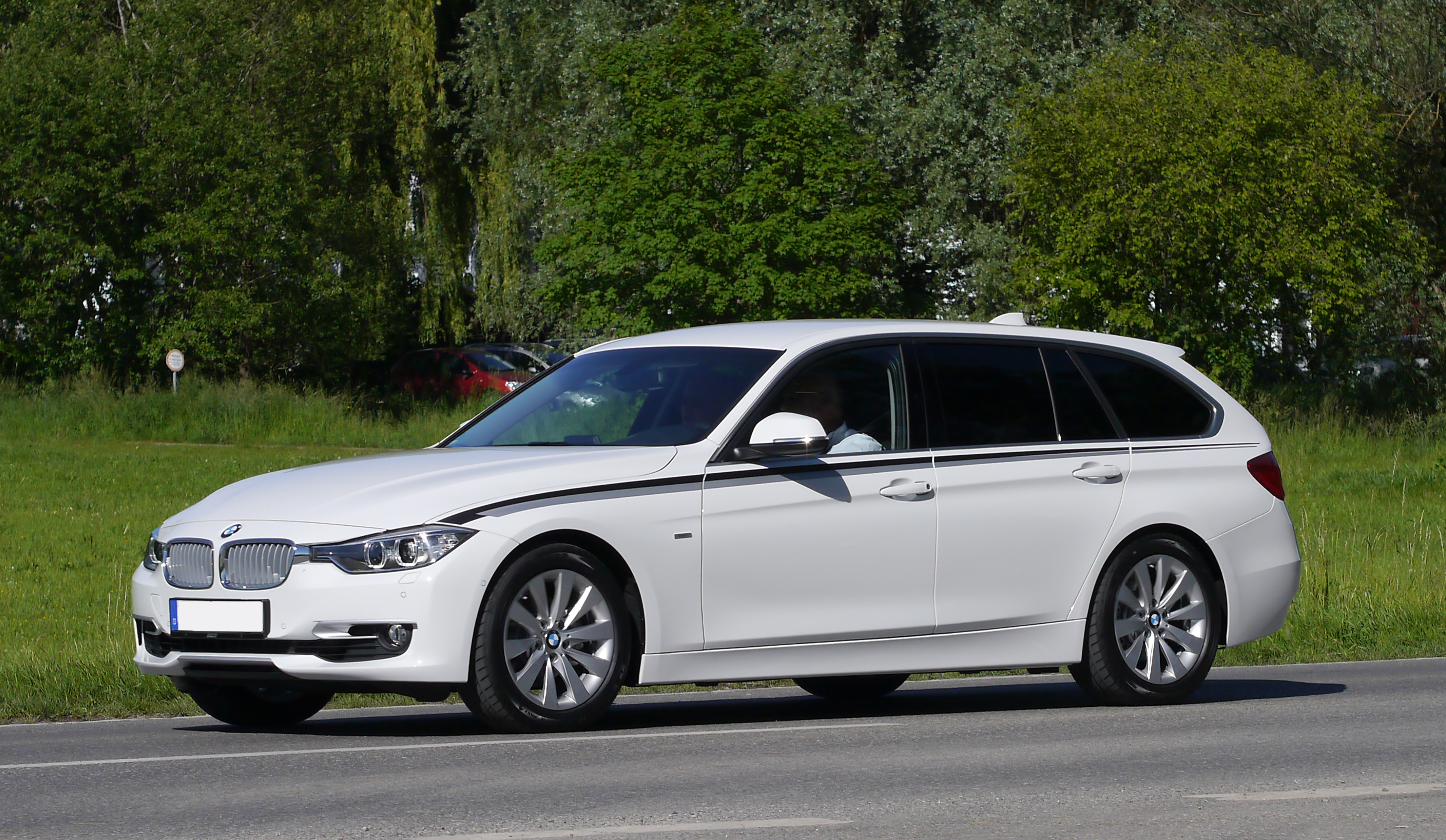 BMW 3er F31 Touring